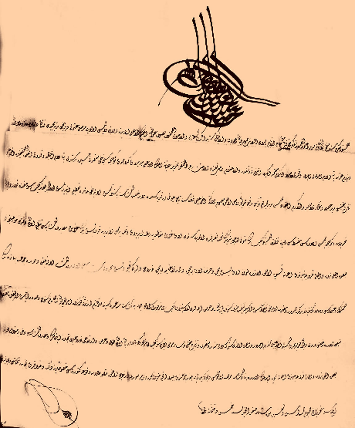 Султански ферман за възстановяване на църквата в село Петково – 1836 г.